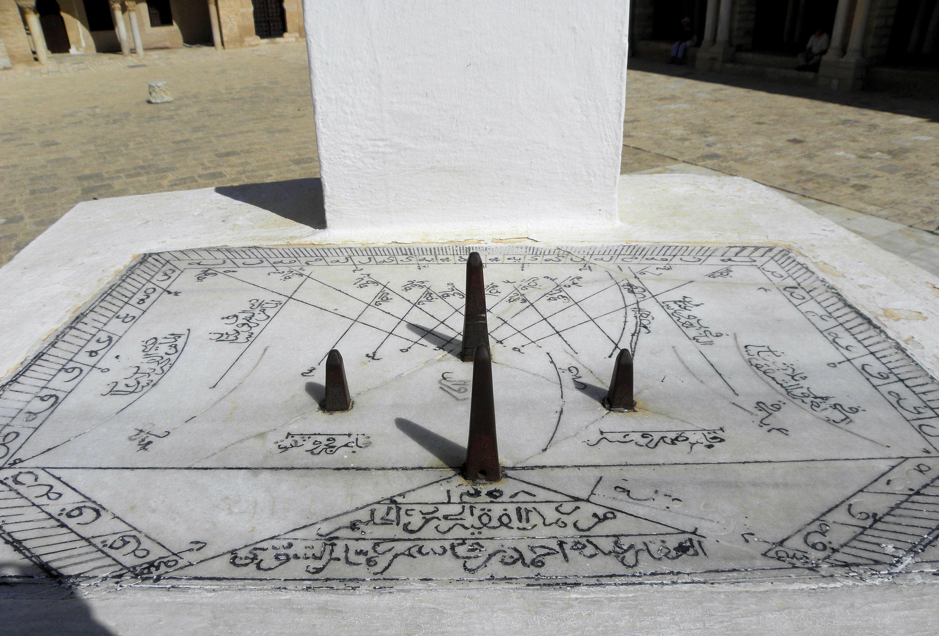 Cadran solaire horizontal situé dans la cour de la Grande Mosquée de Kairouan, en Tunisie.